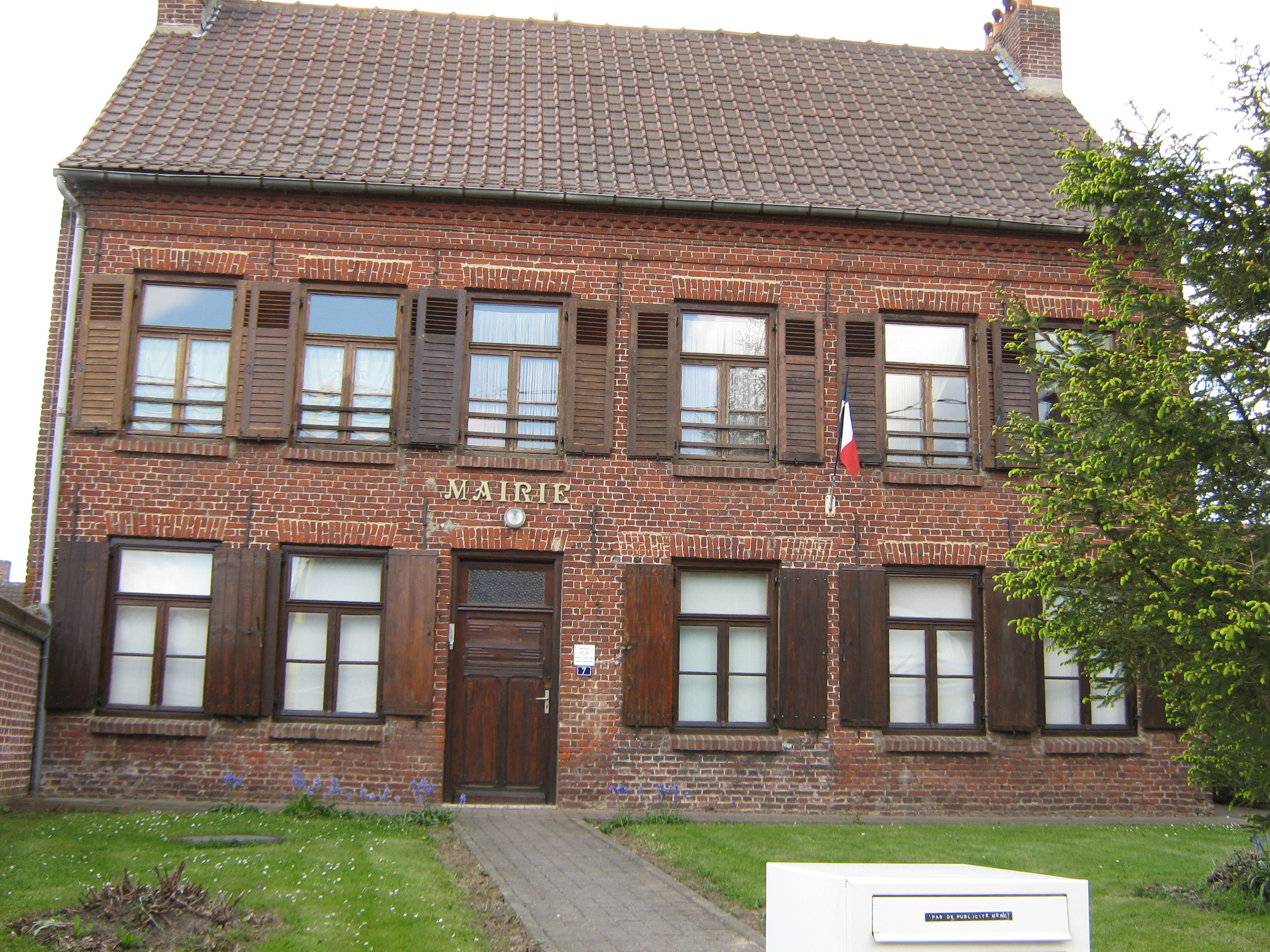 Mairie d'Oxelaëre